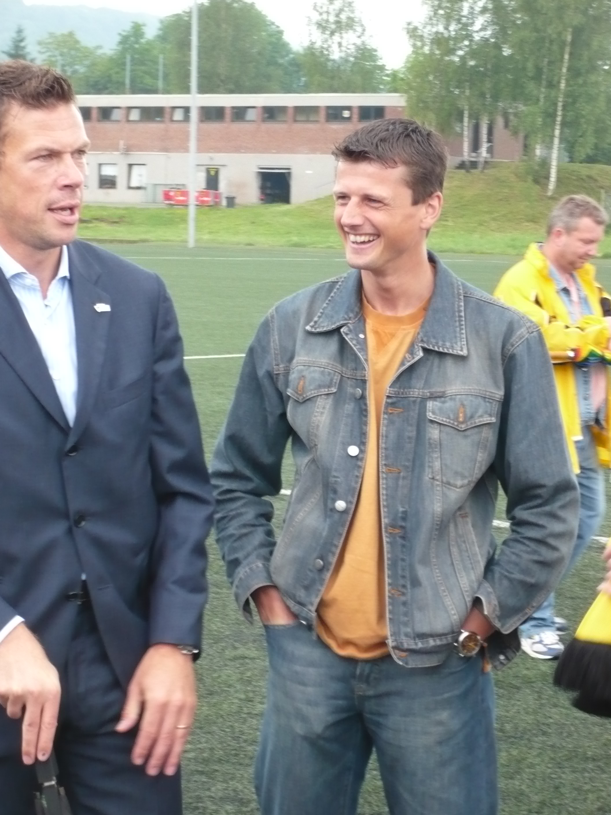 Reiner Plaßhenrich (re.) neben Erik Meijer beim "ersten Spatenstich" zum neuen Tivoli in Aachen am 17. Mai 2008